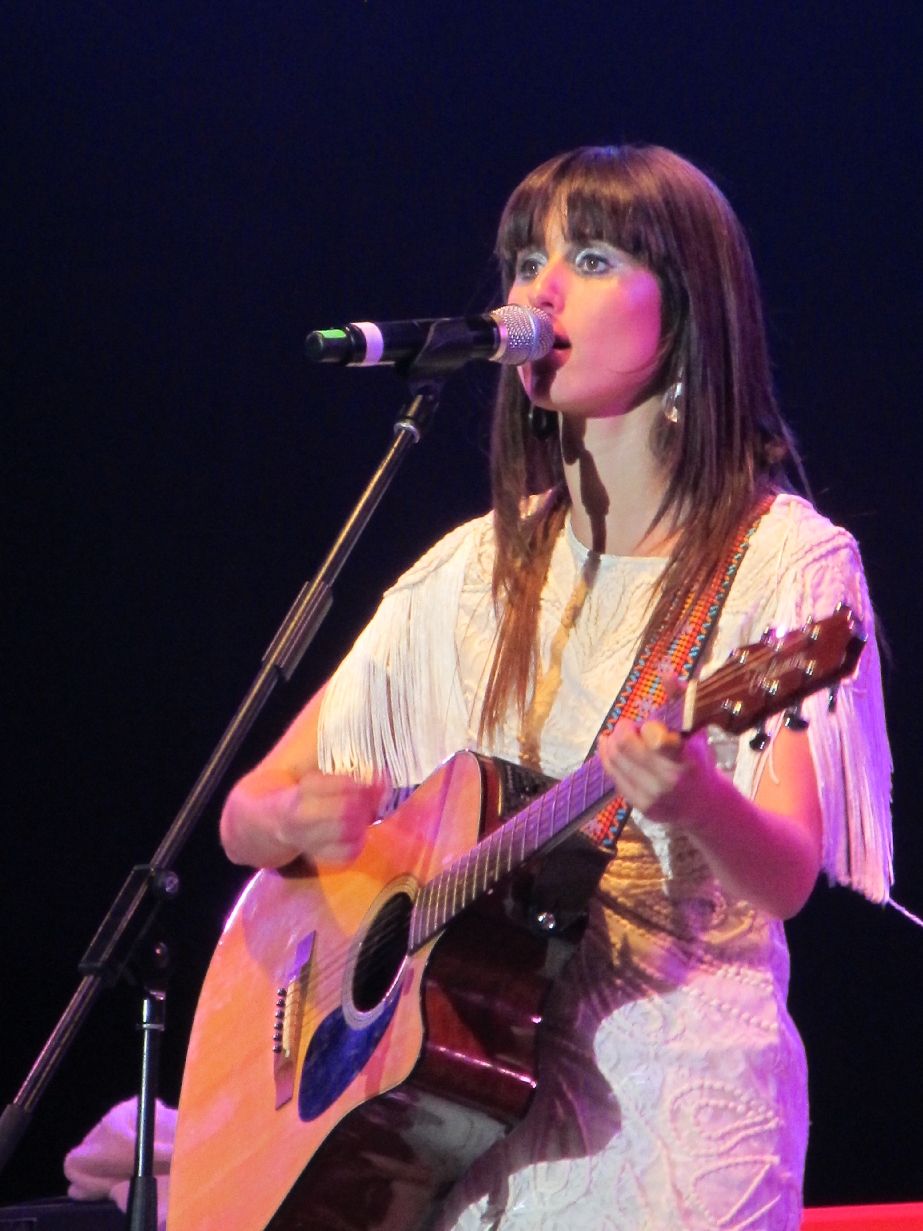 Festival de la Sandía de Paine, Enero del 2012